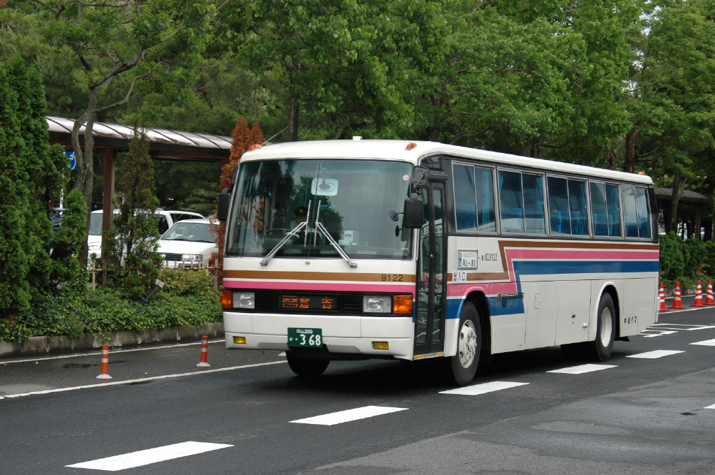 岡山空港にて 2006-7-2撮影